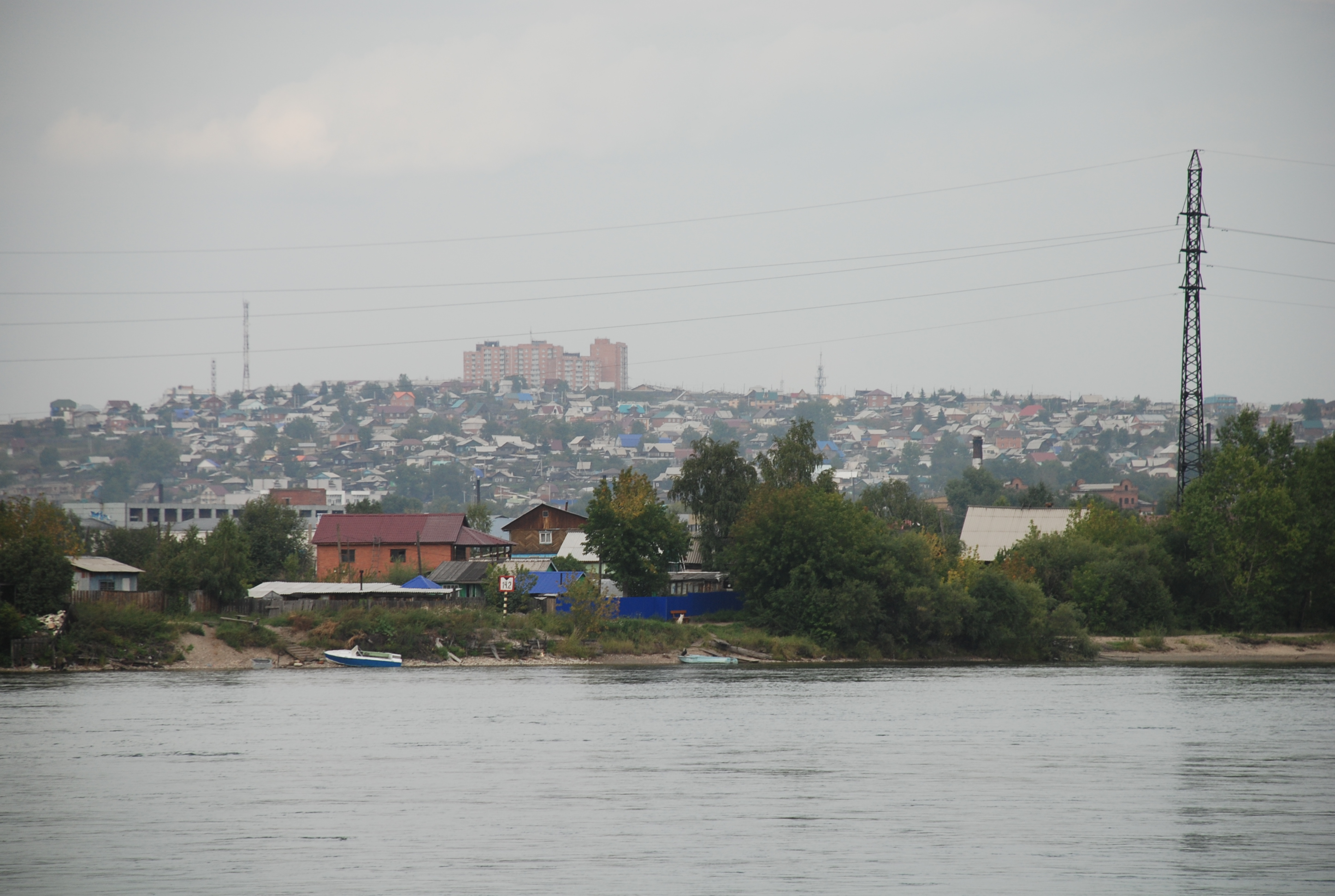 Irkutsk River